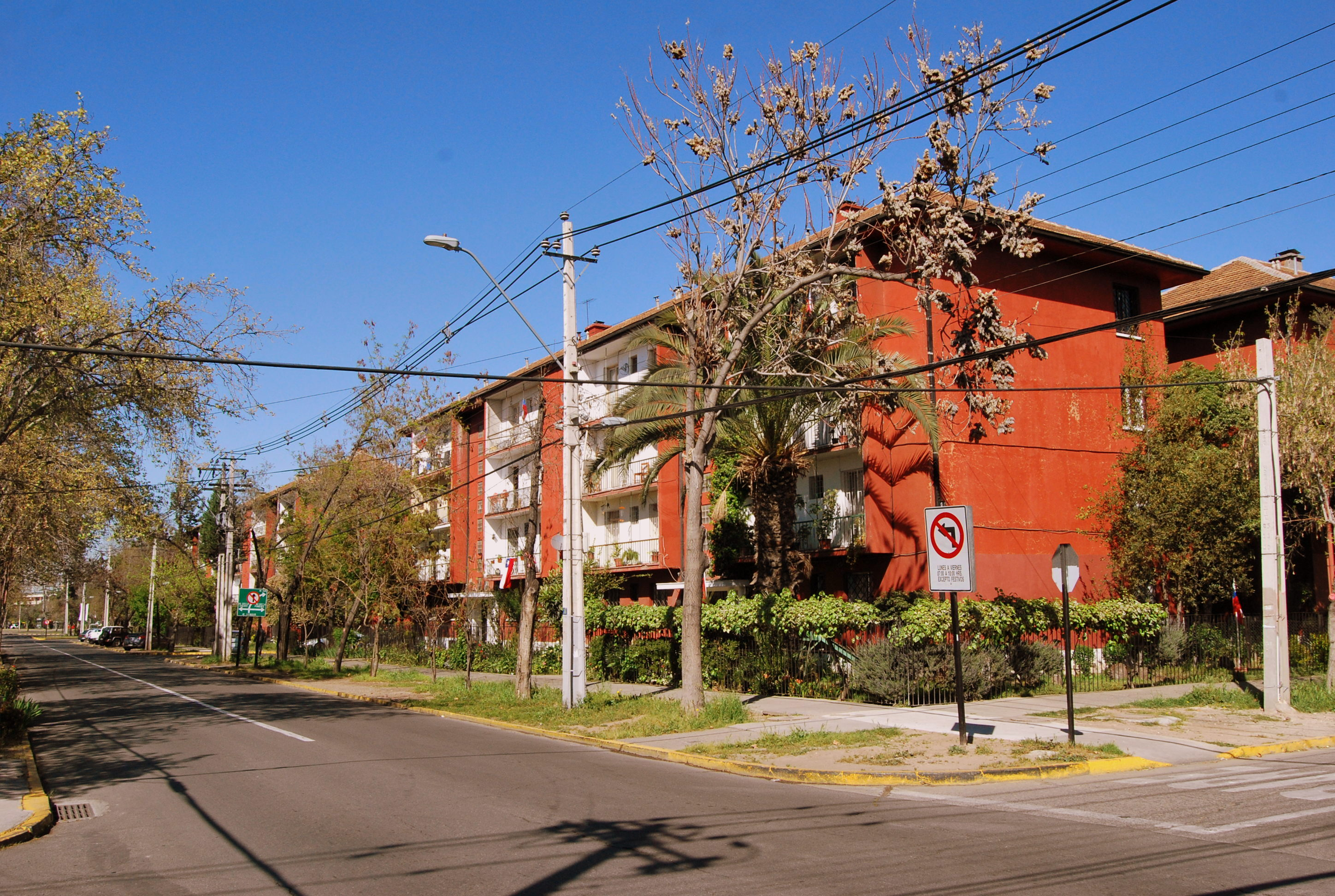 Conjunto habitacional EMPART (Ñuñoa) This is a photo of a national monument in Chile: 2173